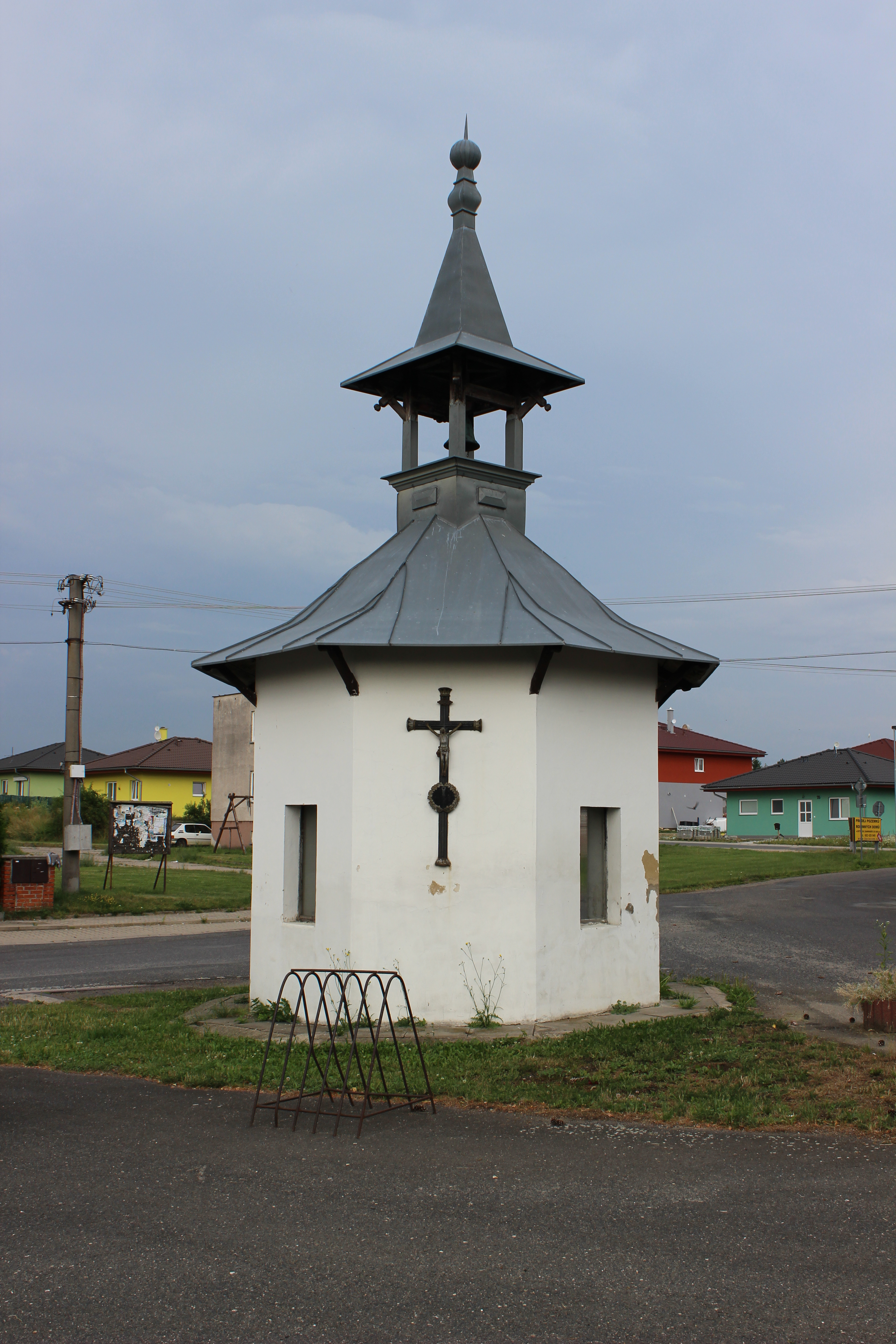 Kaplička na návsi v Hřivně v mladoboleslavském okrese.